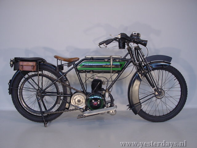 Toestemming van Yesterdays Antique Motorcyles